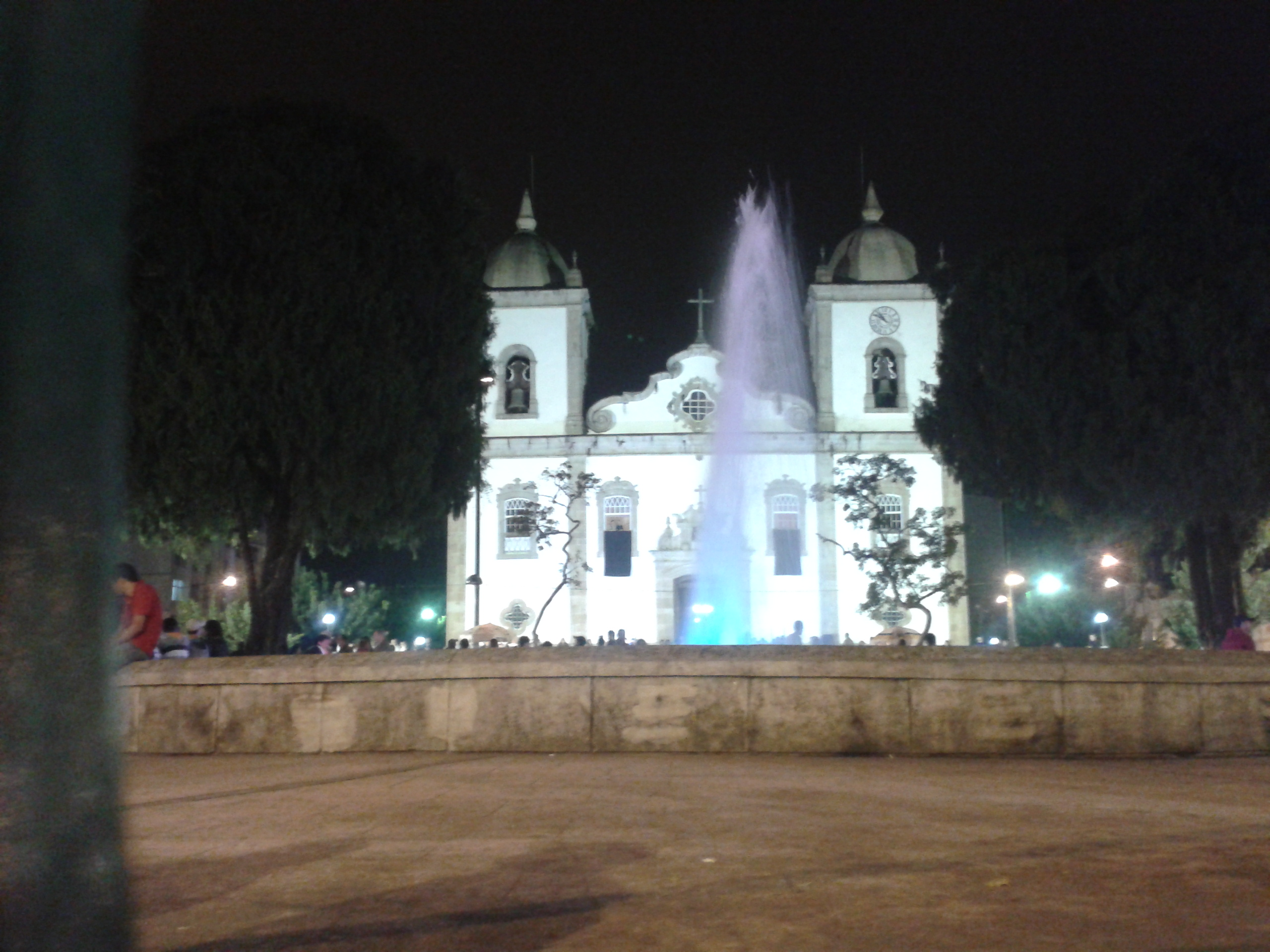 Imagem de Barbacena